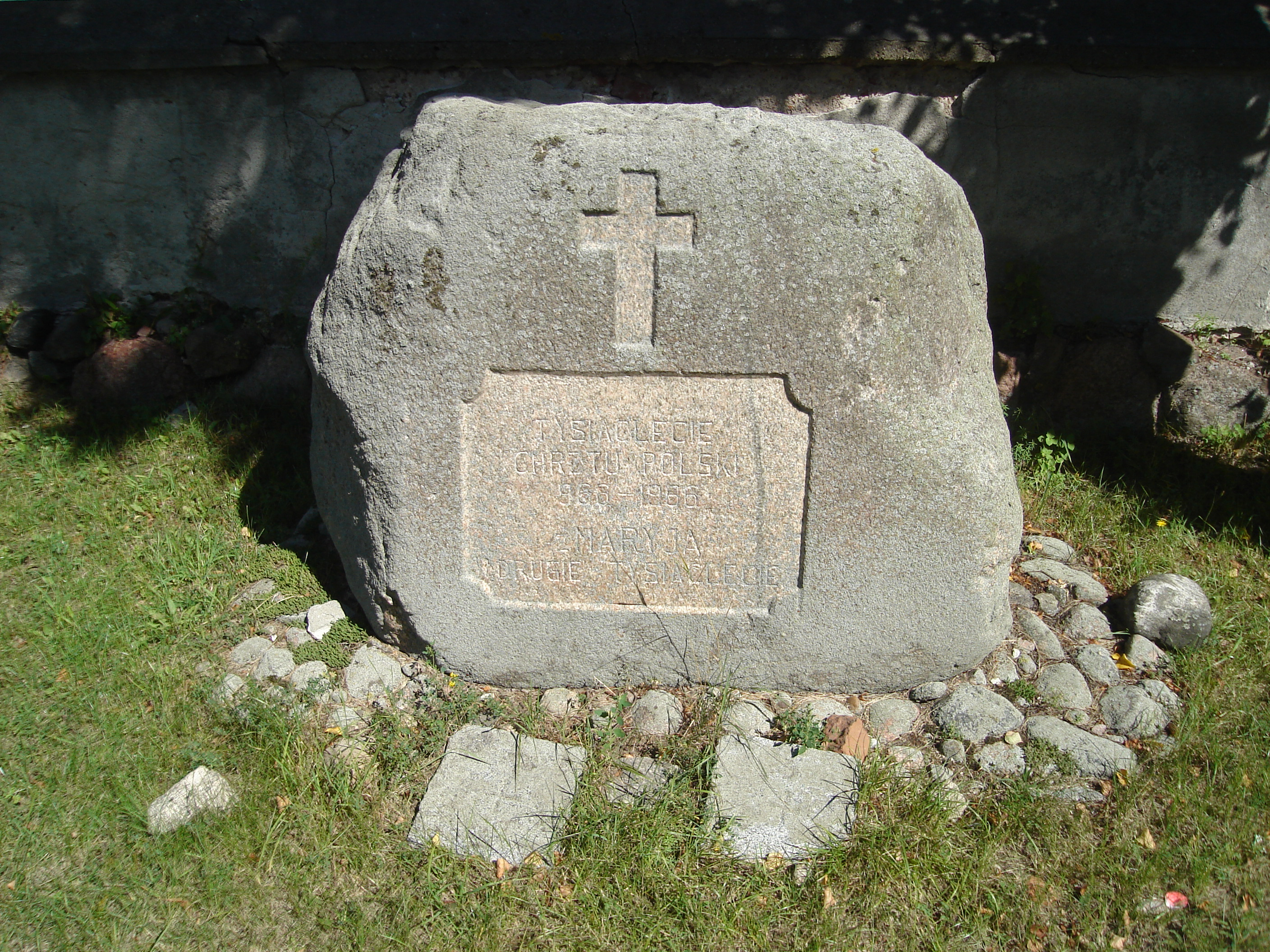 Kościół w Sieluniu. Pamiątkowy głaz na terenie kościoła.